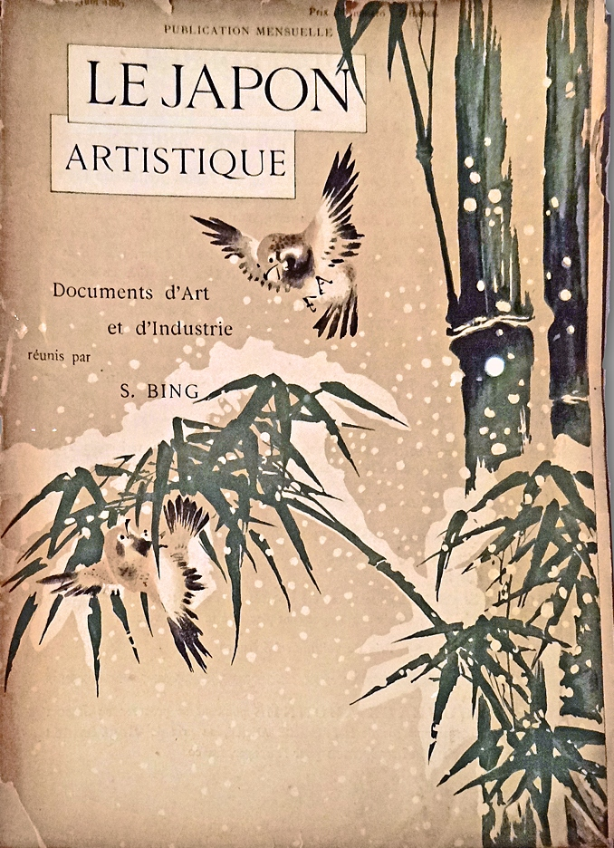 Le Japon artistique Revue d'art éditée de 1888 à 1890 par Siegfried Bing (1838-1905) S. Bing a été le marchand des artistes de l'art nouveau après avoir diffusé des oeuvres d'art japonais. Collection du musée Clemenceau